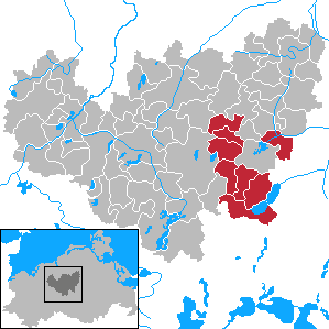 Former Amt Teterow-Land in Mecklenburg-Vorpommern - District Güstrow